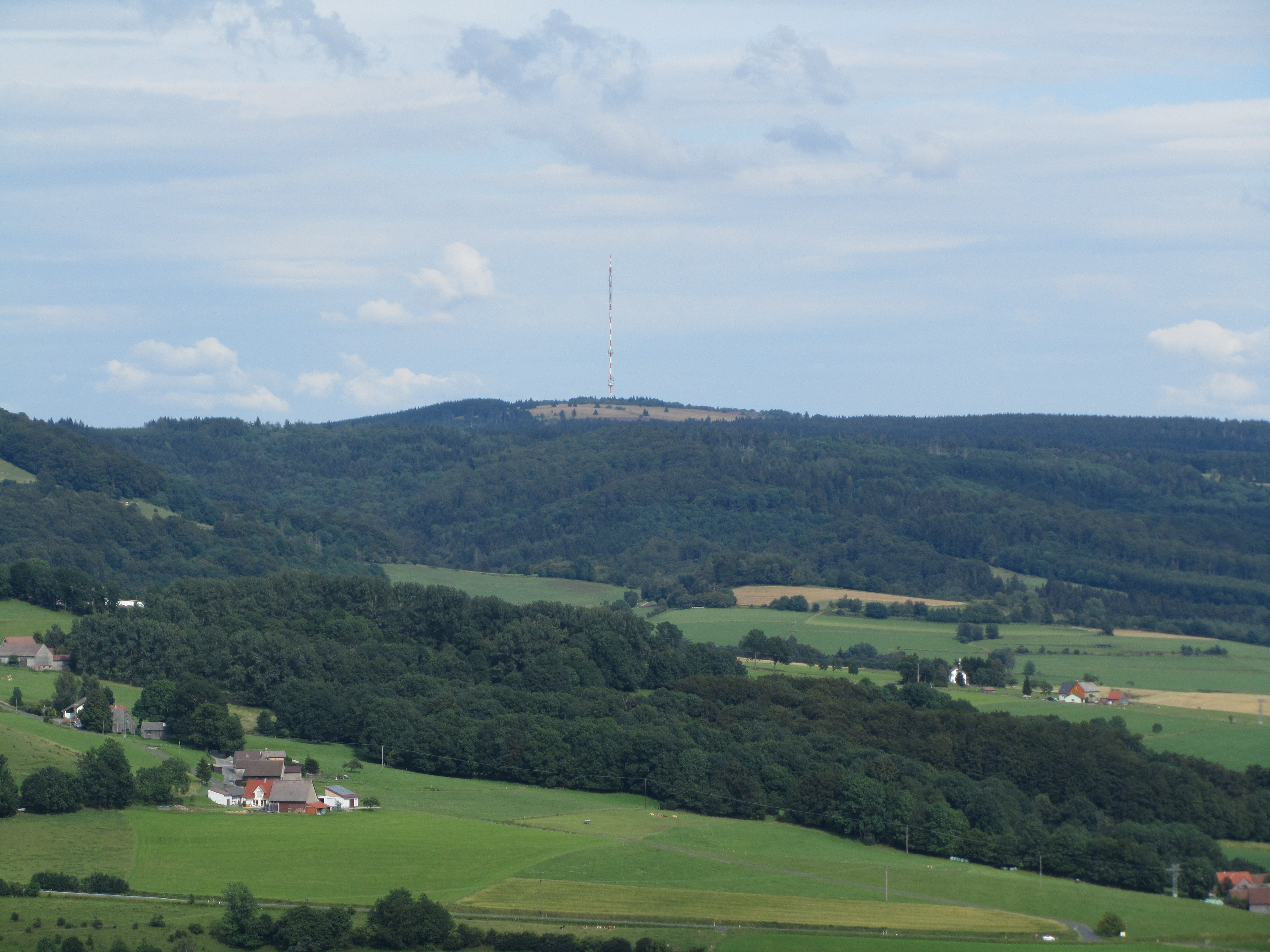 Der Heidelstein (926 m) in der Rhön, gesehen vom Wachtküppel.